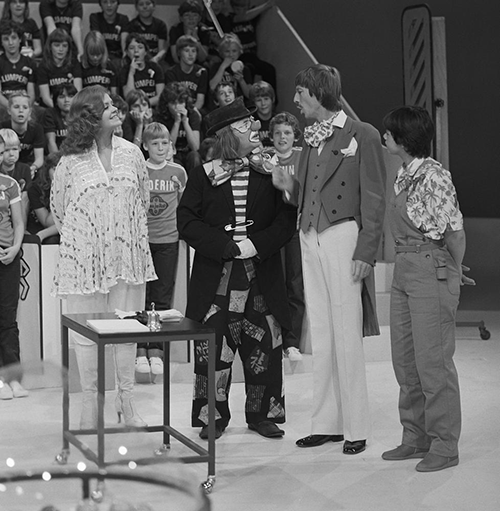 Ab van der Linden als Clown Flappie in Ren je rot in 1981